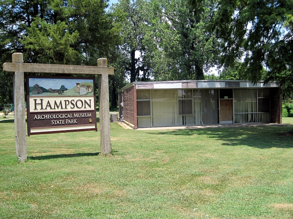 Hampson Museum State Park, Arkansas.